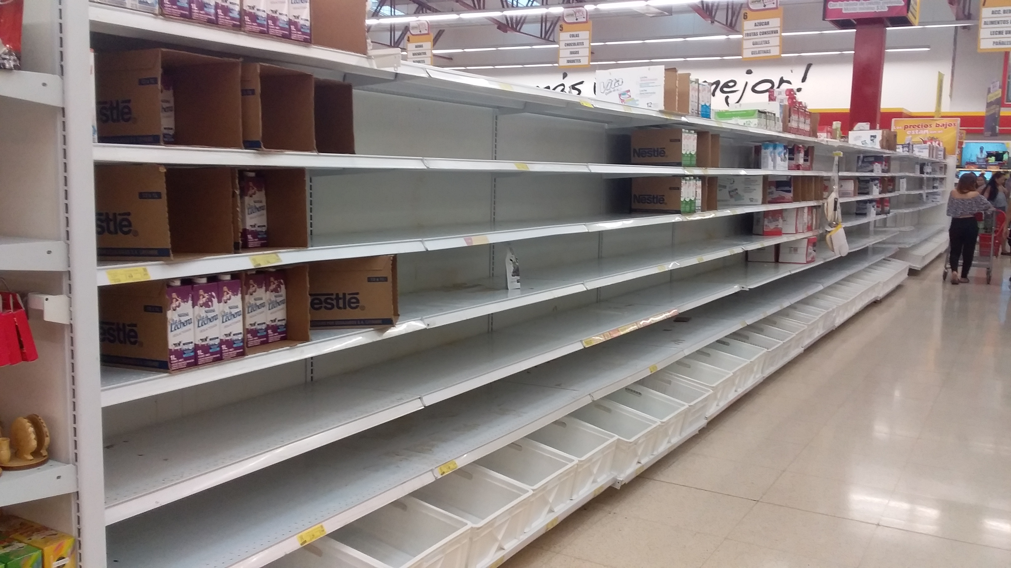 Sector de lacteos desabastecido ante protestas de octubre de 2019 en Ecuador